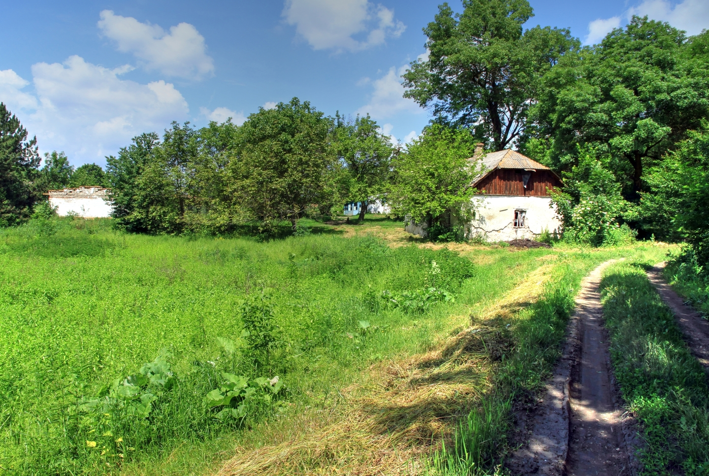 Мындыкский парк, монумент природы, находится в Дондушенский район, Между селами Мындык и Ильичевка (код MD-DN-map-011)